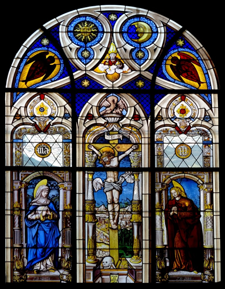 Cathédrale St-Nicolas de Fribourg (Suisse). Vitrail de Carignan (portail nord).